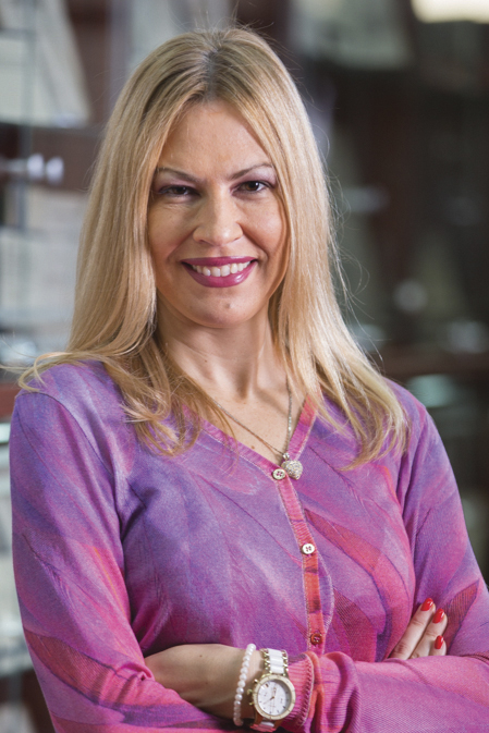 Српски (ћирилица): професор др Маша Кулаузов